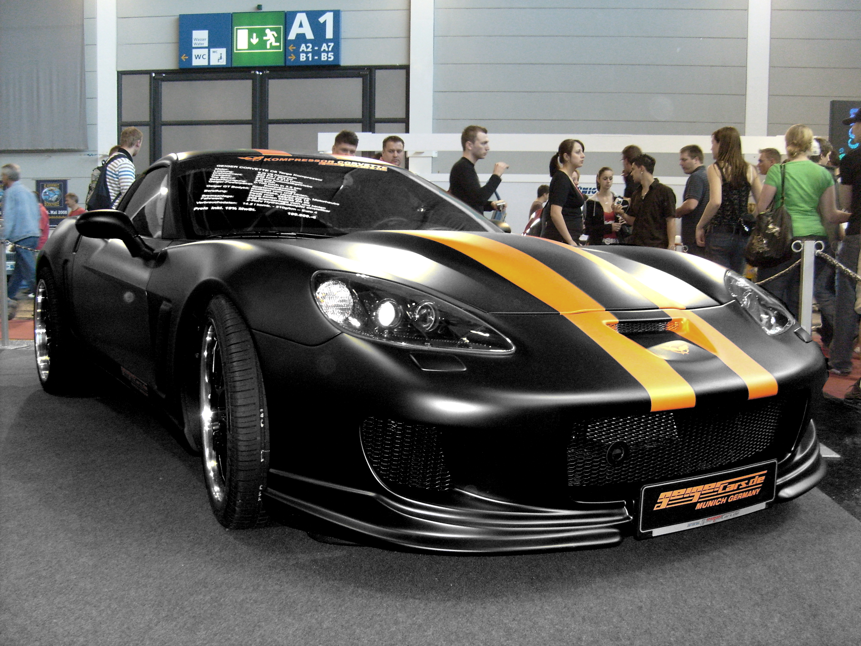 Chevrolet Corvette C6